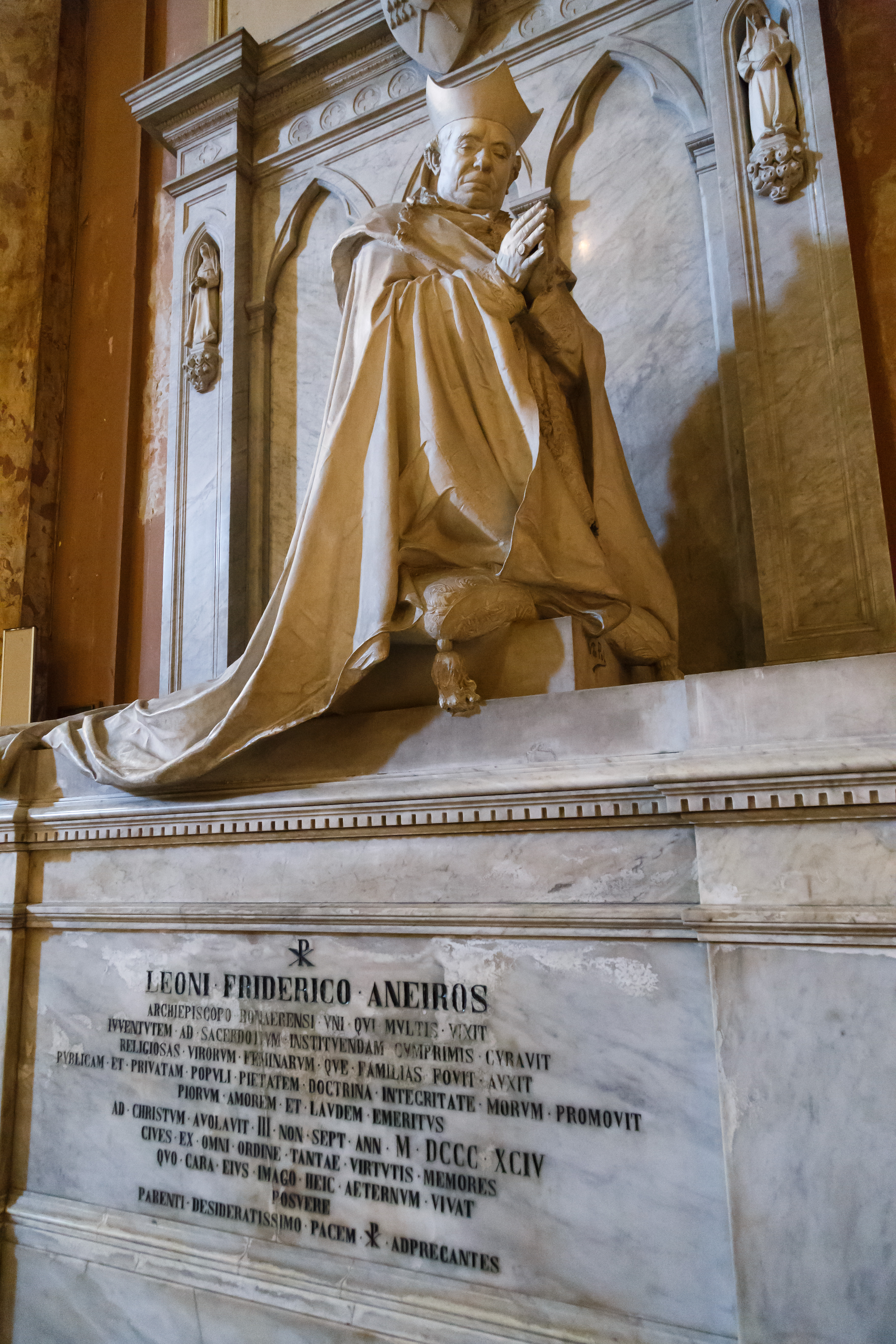 Interior de la Catedral Metropolitana de Buenos Aires. Tumba de León Federico Aneiros junto al retablo privilegiado de San Martín de Tours.